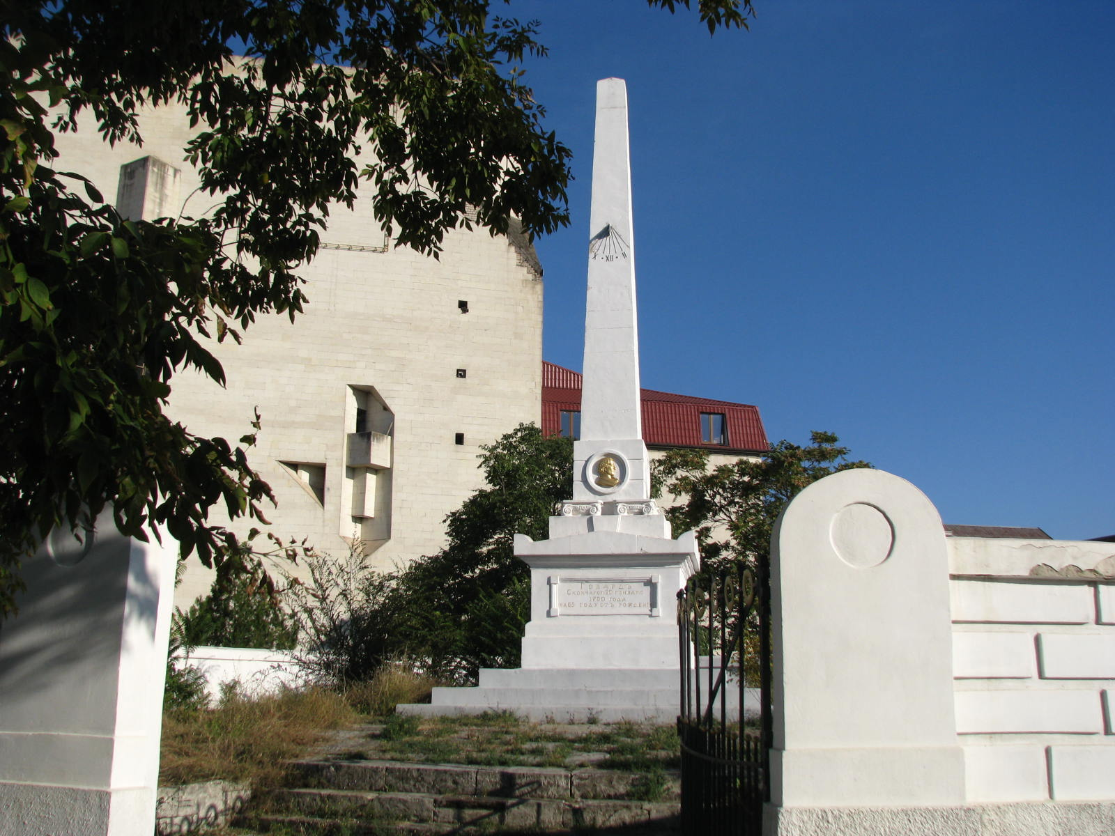 Пам'ятник Джону Говарду, Херсон, Ушакова просп.